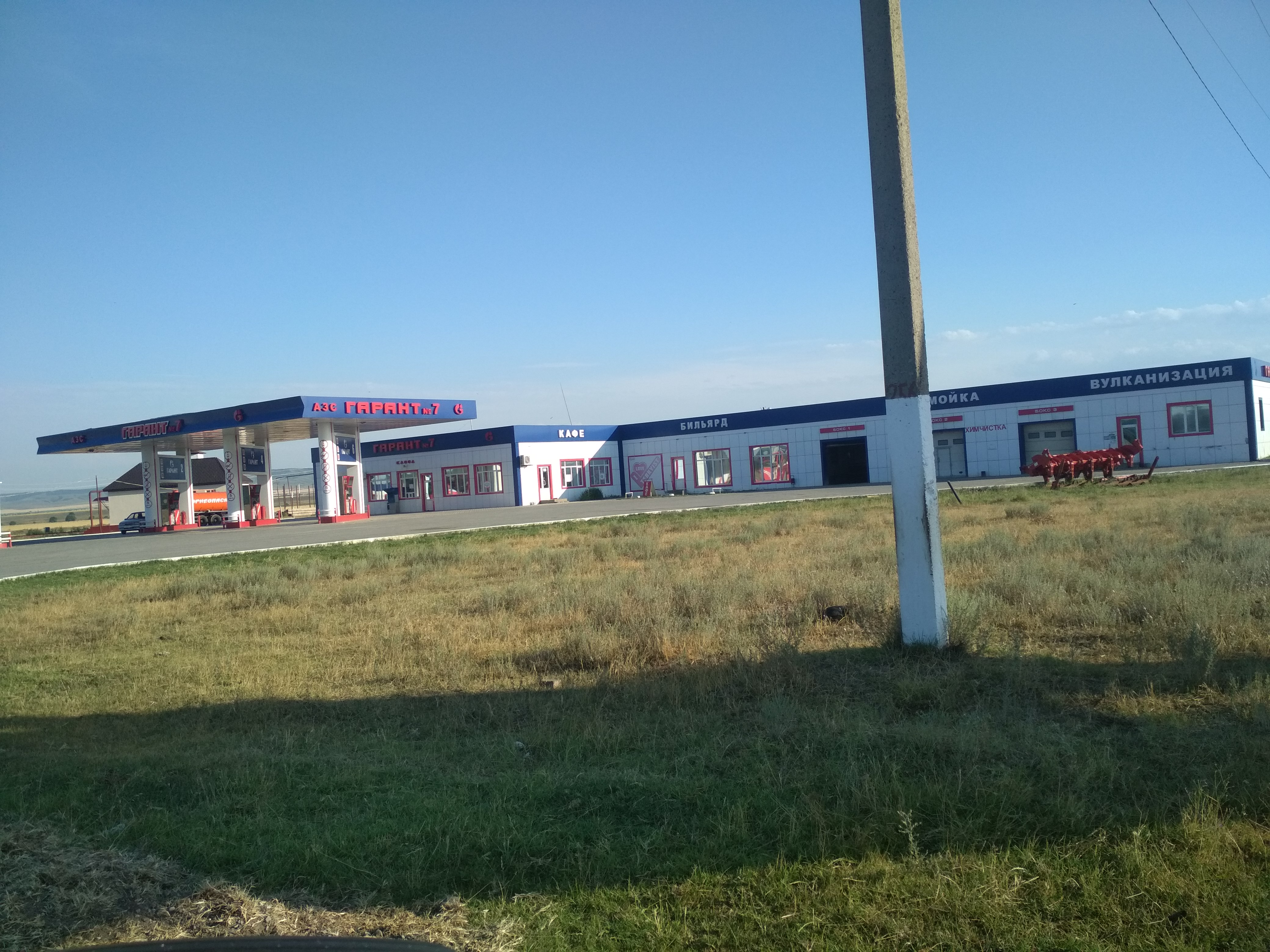 Нохчийн: Эмасулера заправка